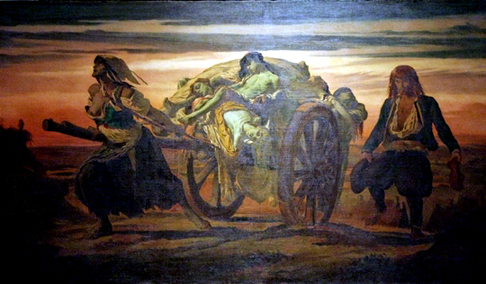 La plaga de Elliant, es una pintura al óleo realizada por el pintor francés Louis Duveau en el año 1849